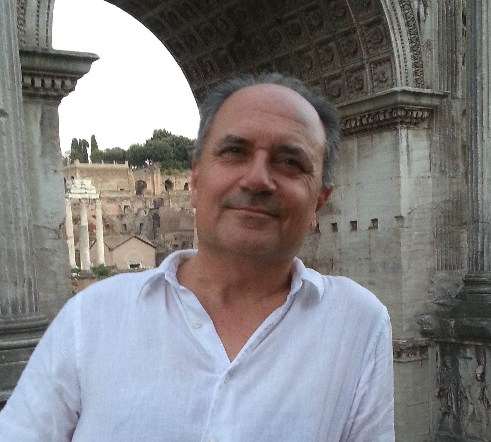 Claudio Damiani al Foro romano, estate 2018